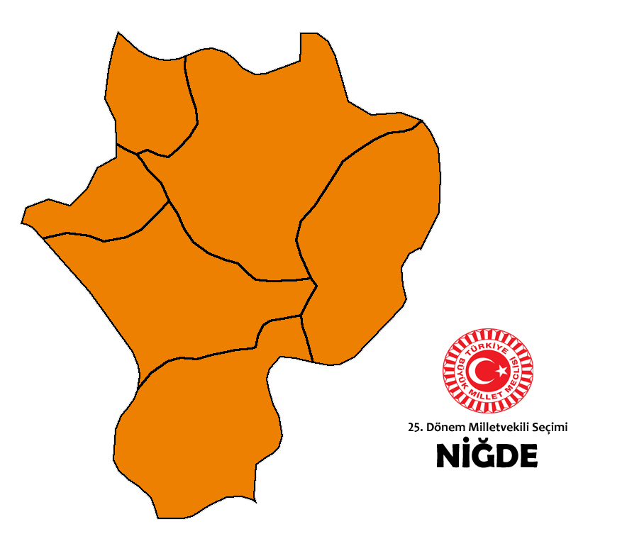 2015 genel seçim sonuçları